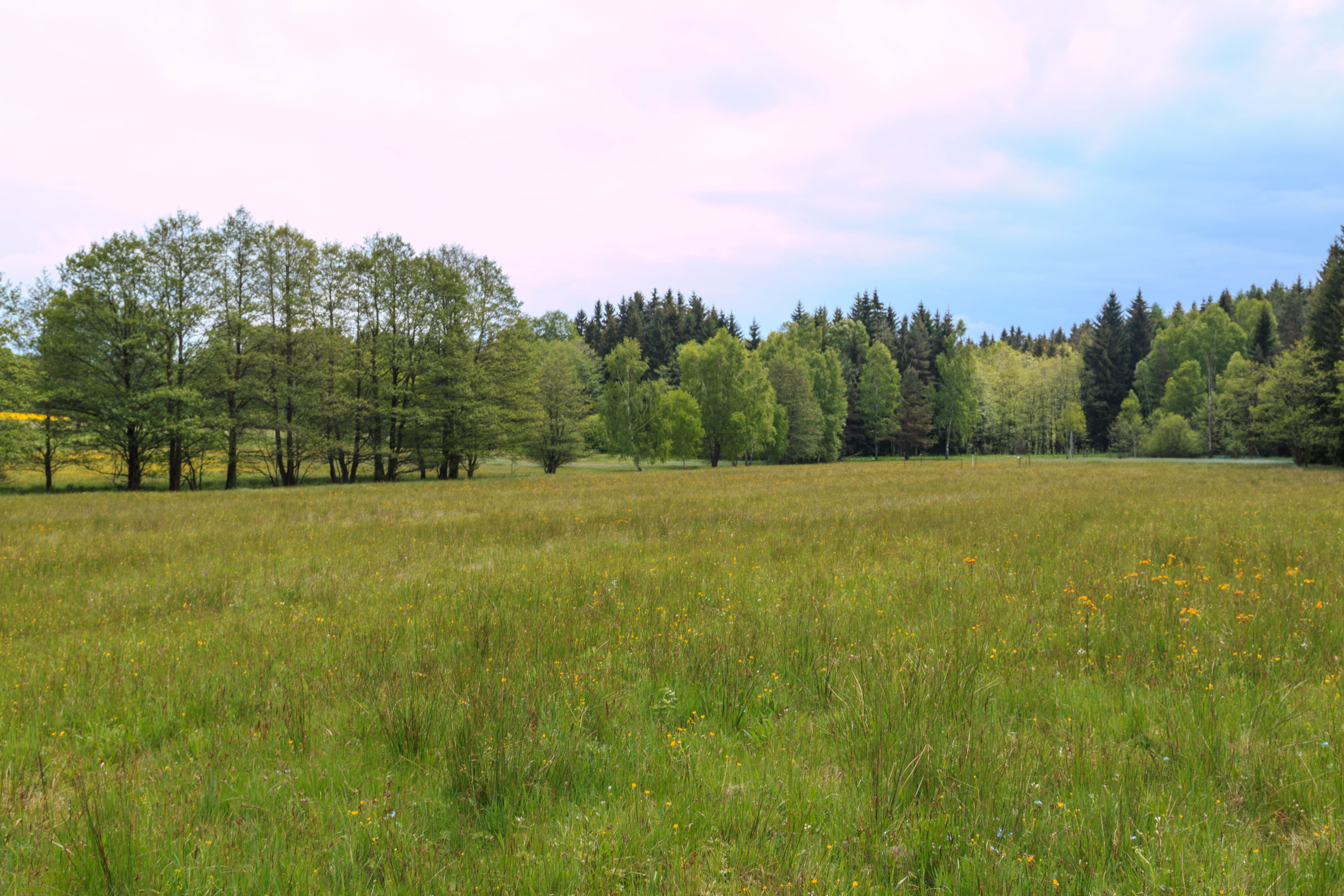 Přírodní rezervace Maršálka Project: Chráněná území.